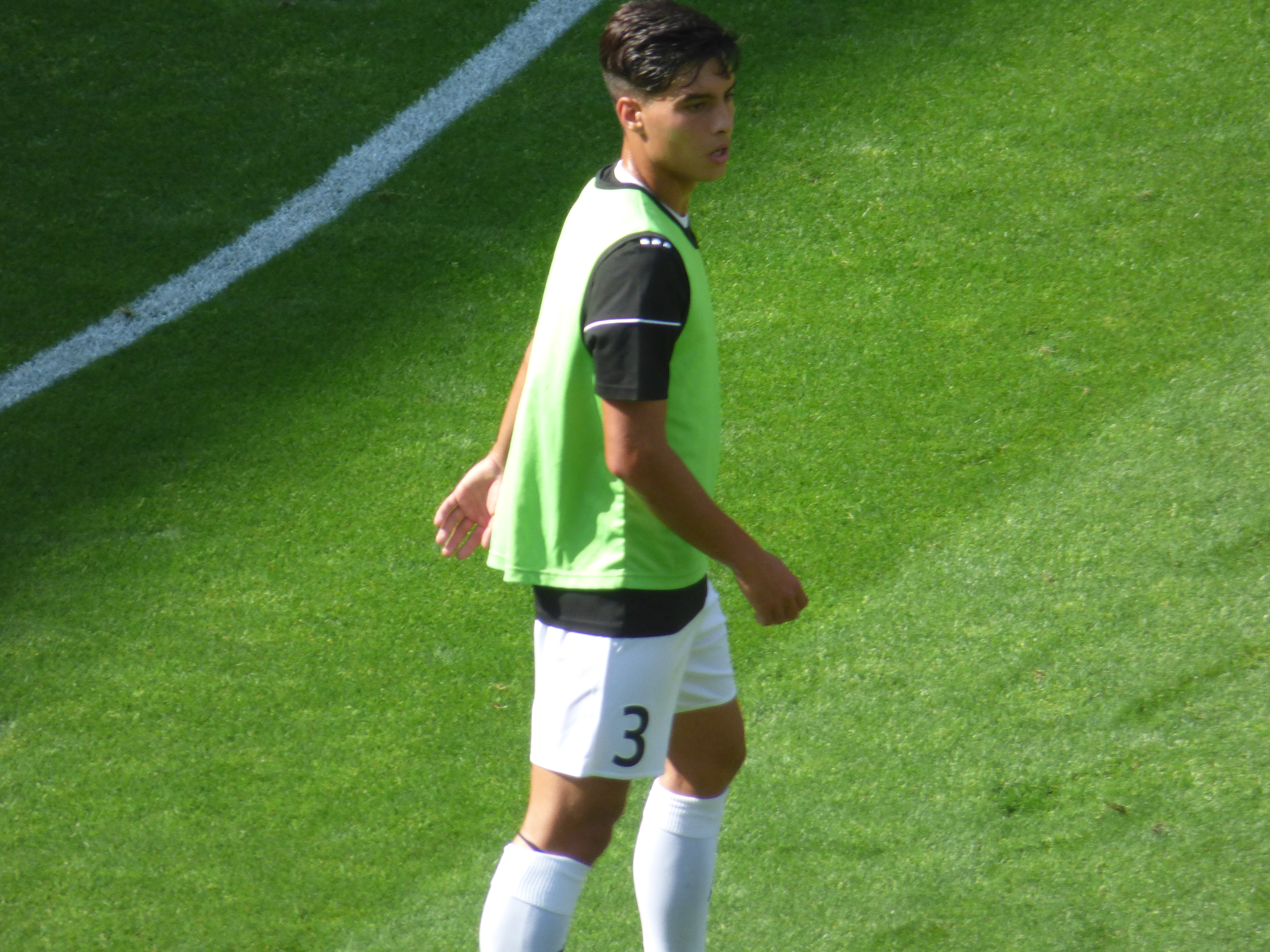 Matias Ferreira avant le match RC Lens / Red Star, comptant pour la deuxième journée du championnat de France de Ligue 2 2018-2019 au Stade Bollaert-Delelis, le 4 août 2018.